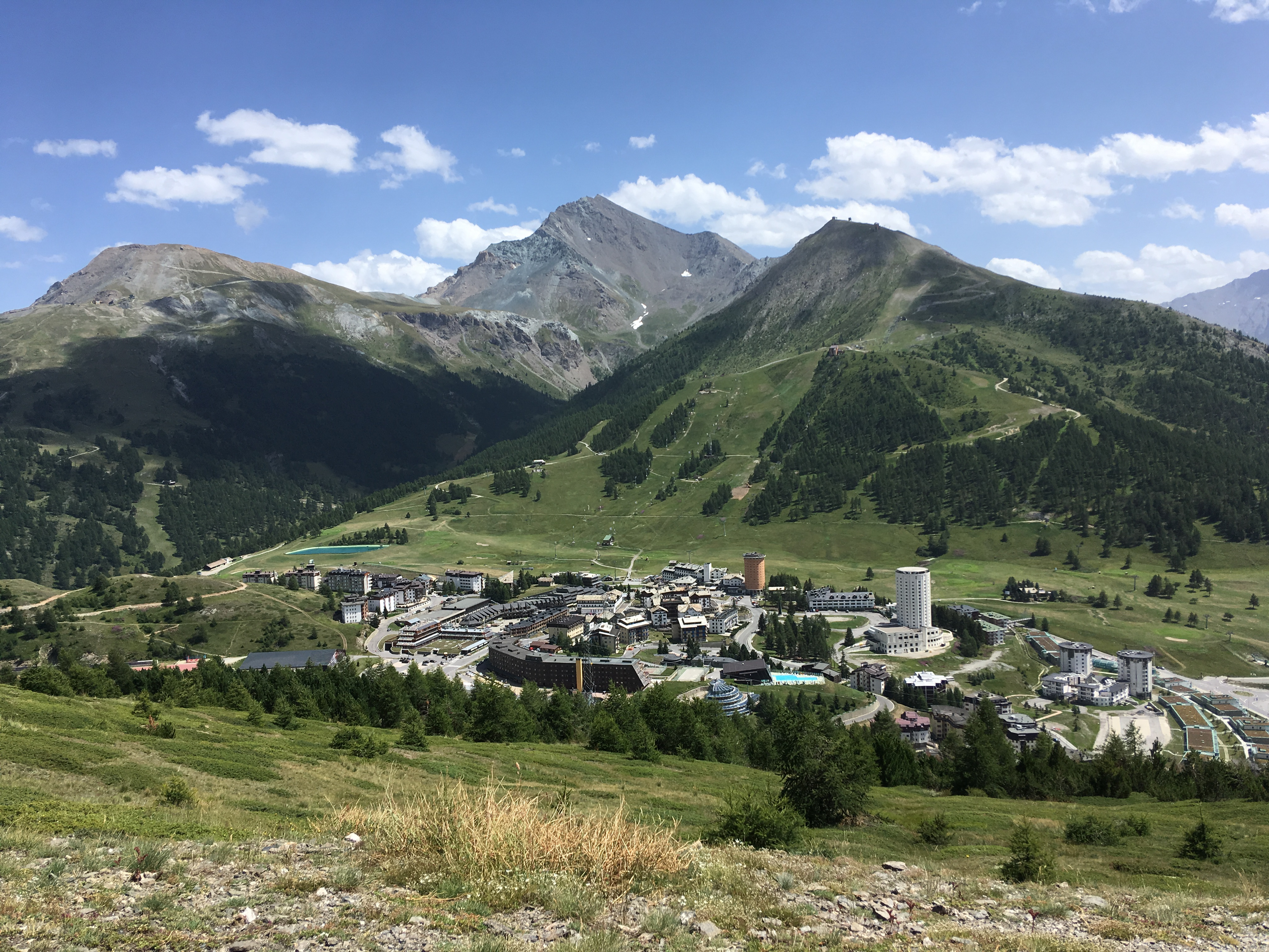 Panorama di Sestriere